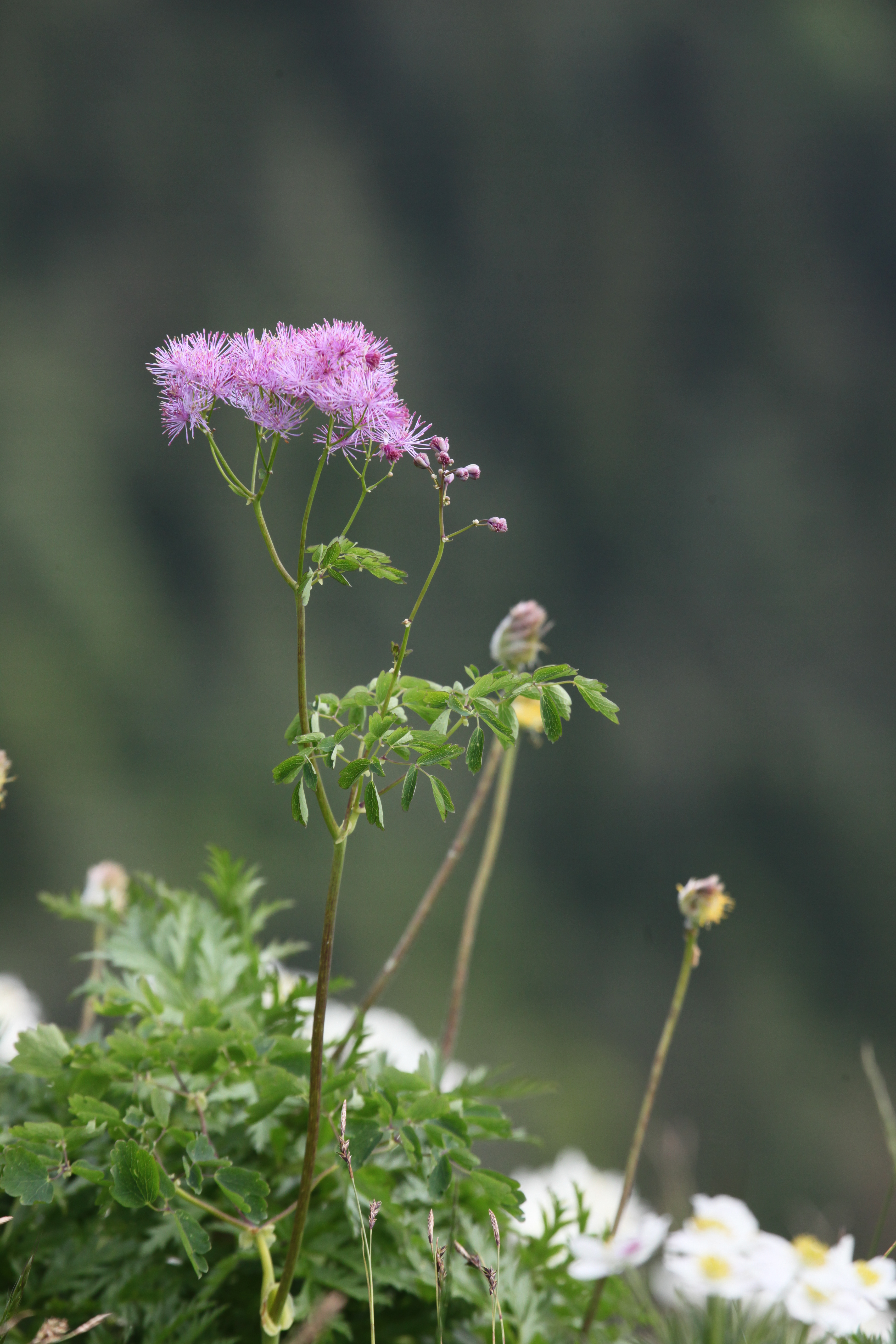 Pigamon à feuilles d'ancolie (Thalictrum aquilegiifolium) au Creux du Van.